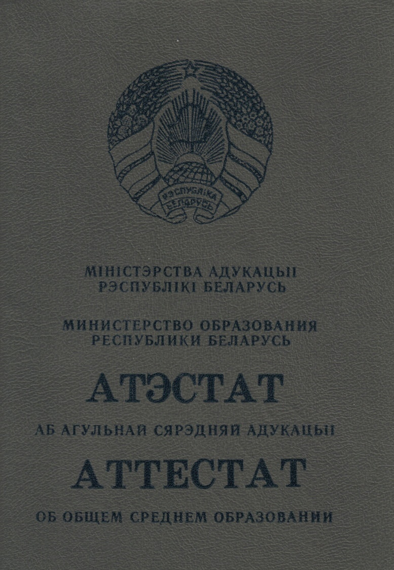 Атэстат. Рэспубліка Беларусь. 2003 год